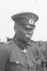 Hans von Seeckt: MdR, Generaloberst, Chef der Heeresleitung, Orden Pour le mérite, Deutschland (GND 118612603)